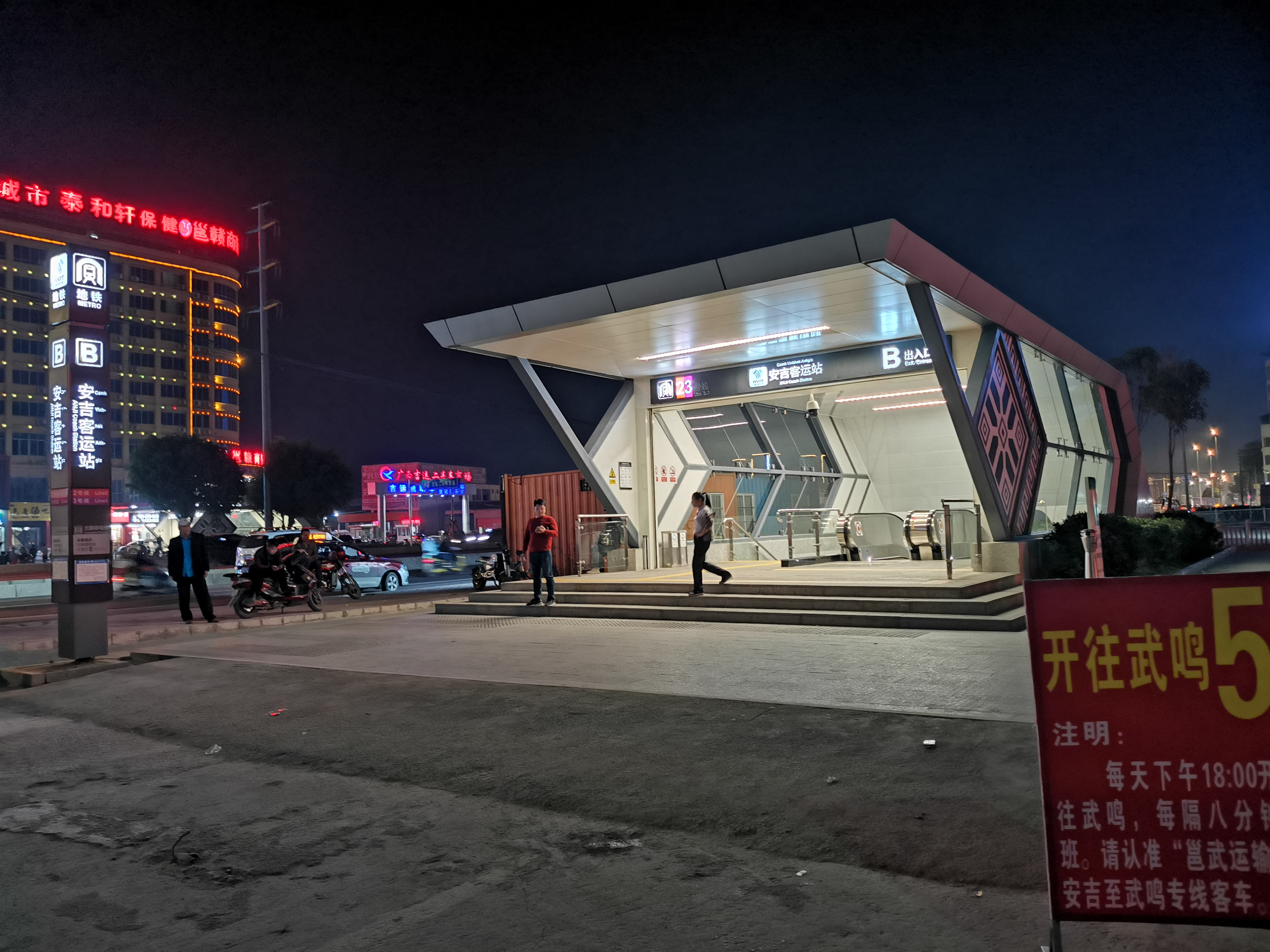 南宁轨道交通五象湖站D出口